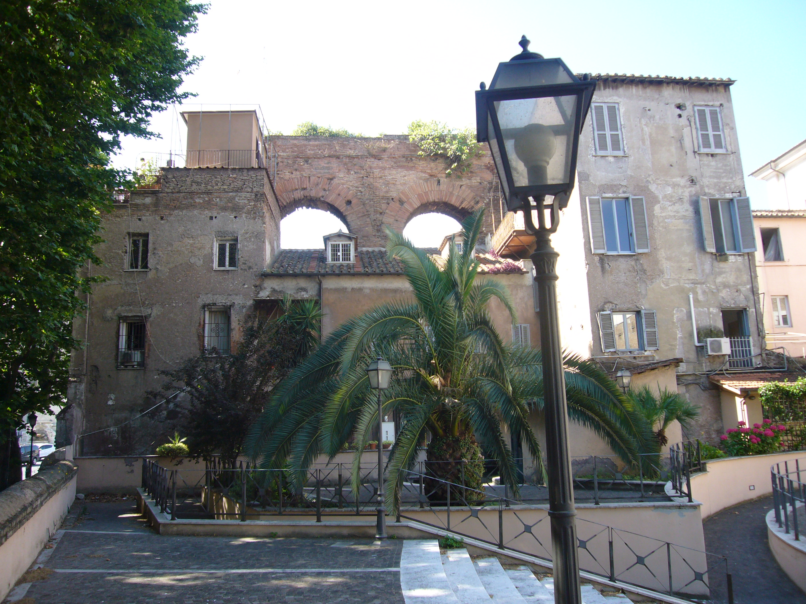 Roma, Ospedale delle donne a s. Giovanni. Fornici dell'acquedotto neroniano incorporato nella fabbrica